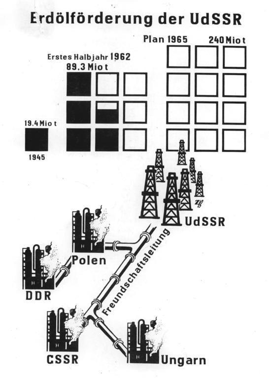 Zentralbild-Stolp 6.9.1962 Erdölförderung der UdSSR. Die sowjetische Erdölindustrie hat mit einer Halbjahresbilanz 1962 von 89.3 Mio. t ihre Aufgaben zur raschen Steigerung der Produktion erfüllt. In diesem Jahr wird die Sowjetunion fast zehnmal mehr Öl als 1945 fördern. Das Entwicklungstempo ist so stürmisch, daß die ursprünglichen Ziele des Siebenjahrplanes erhöht werden konnten. Für das Jahr 1965 wird mit einer Jahresproduktion von 240 Mio. t gerechnet. Die Erfolge der sowjetischen Erdölindustrie kommen vielen Ländern des sozialistischen Lagers zugute, die keine oder nur geringe Erdölvorräte haben. Der Bau der Freundschaftsleitung nach Polen, der DDR, der CSSR und Ungarn macht schnelle Fortschritte.